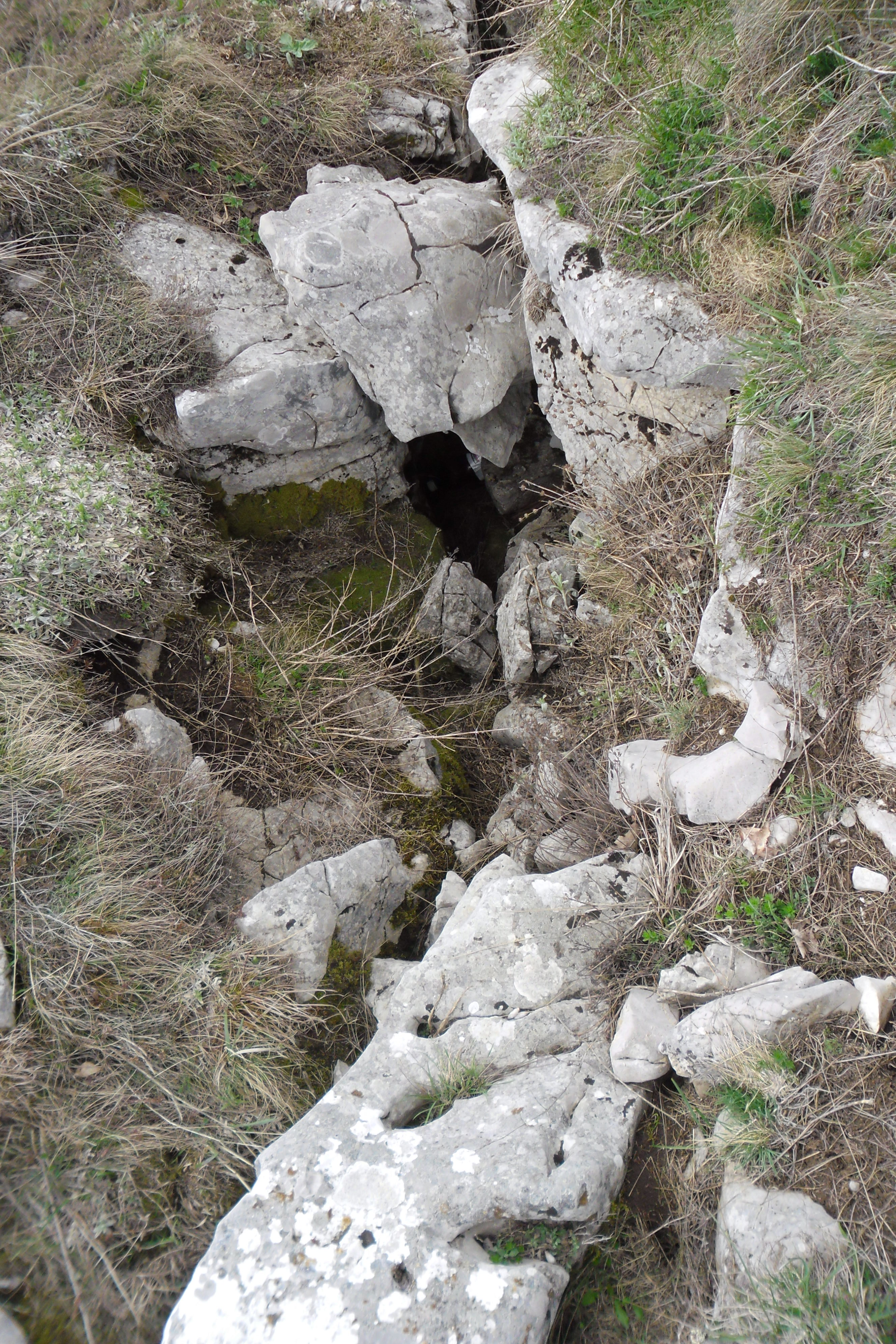 Карст